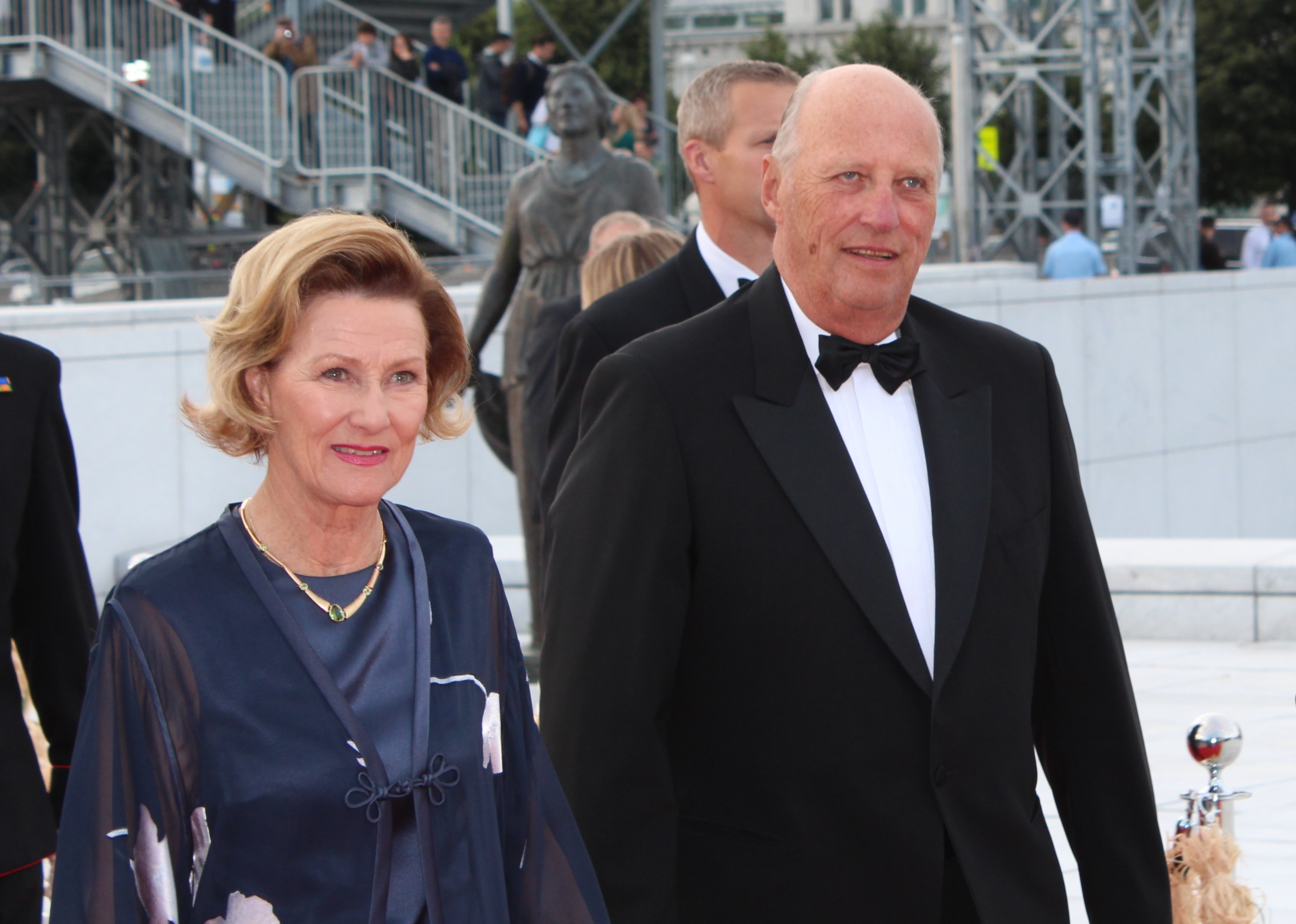 Deres Majesteter Kongen og Dronningen var til stede på festpremieren på den nye filmen om Kon-Tiki på Operaen i Oslo.